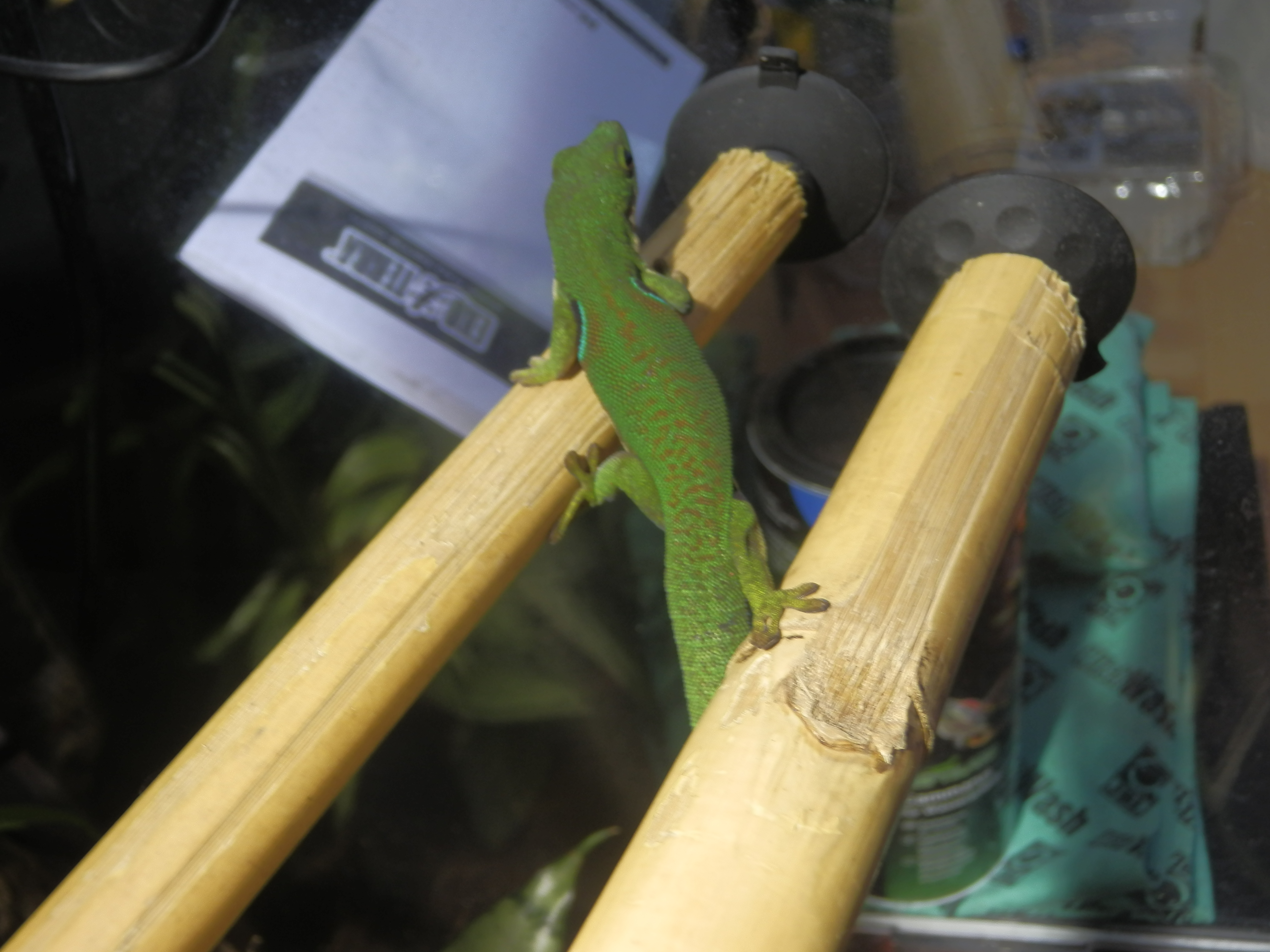 Augenfleck-Taggecko